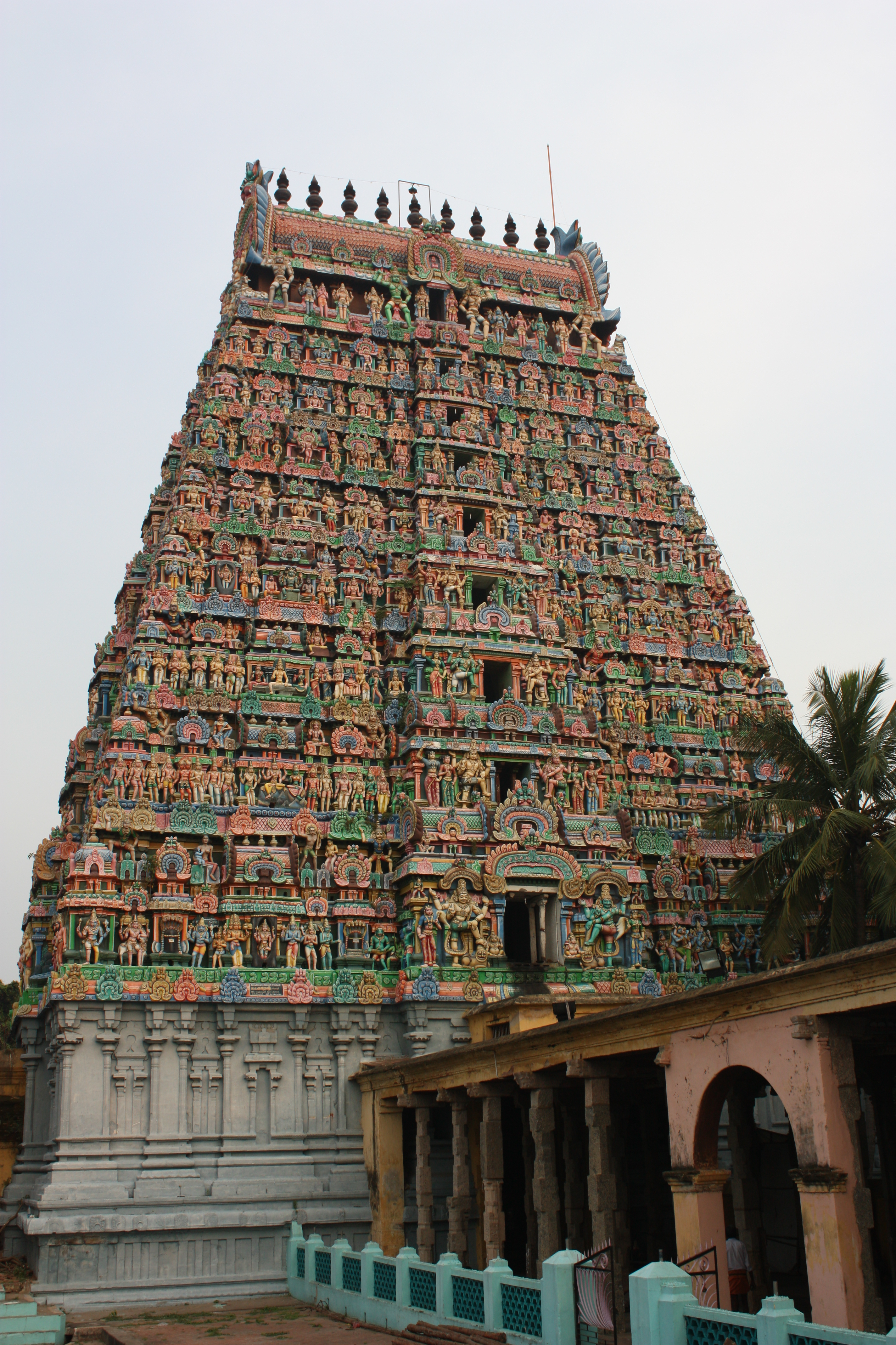 Kumbakonam, Kumbeshwara Temple